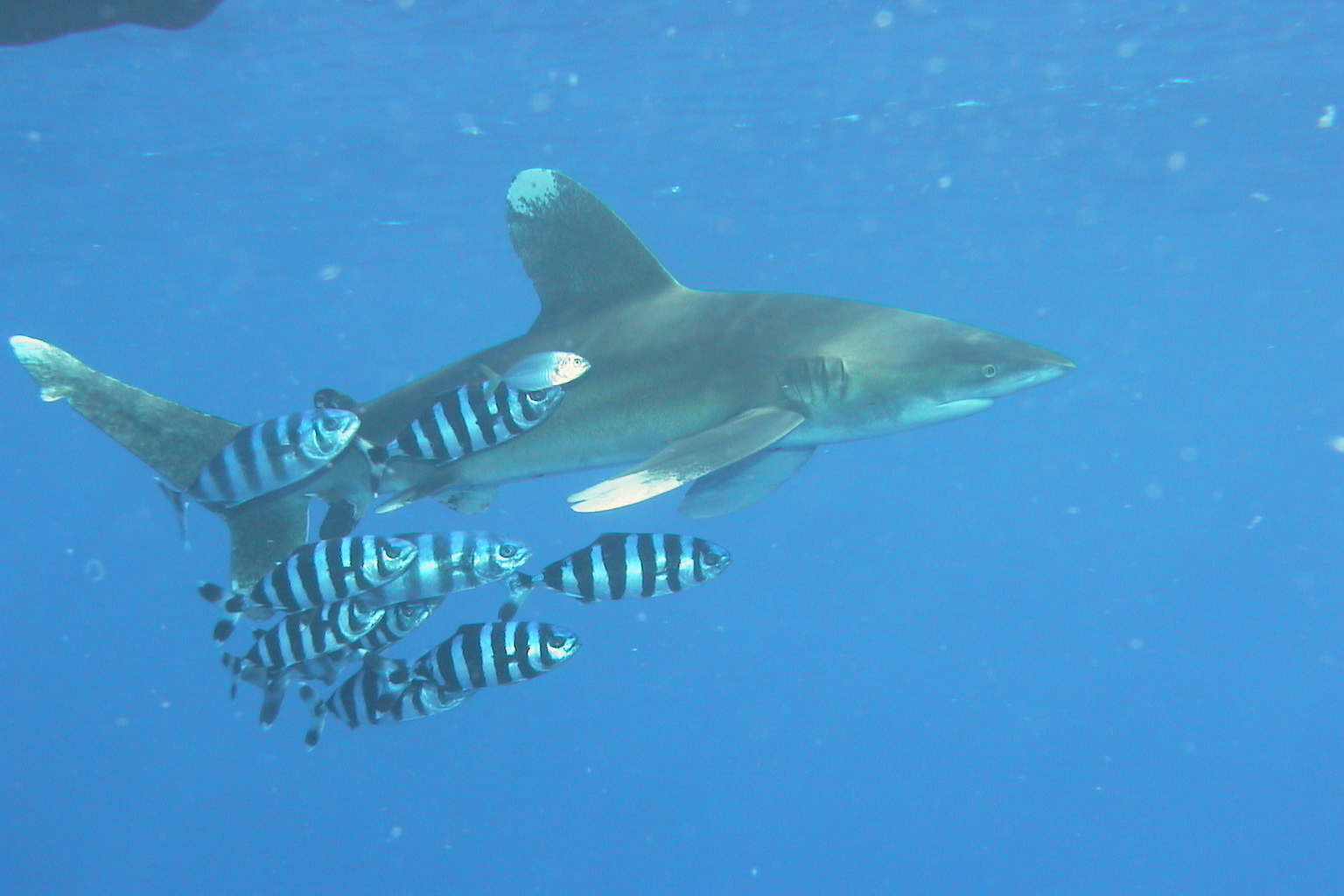 Carcharhinus longimanus, ca. 2.50m lang, Tiefe ca. 2-3m, mit Pilotbarschen. Fotografiert am 09.06.2002 am Elphinstoneriff / Rotes Meer / Ägypten Das Fotos wurde von mir selbst erstellt und ist im Originalzustand (also nicht bearbeitet) Weitere Fotos unter